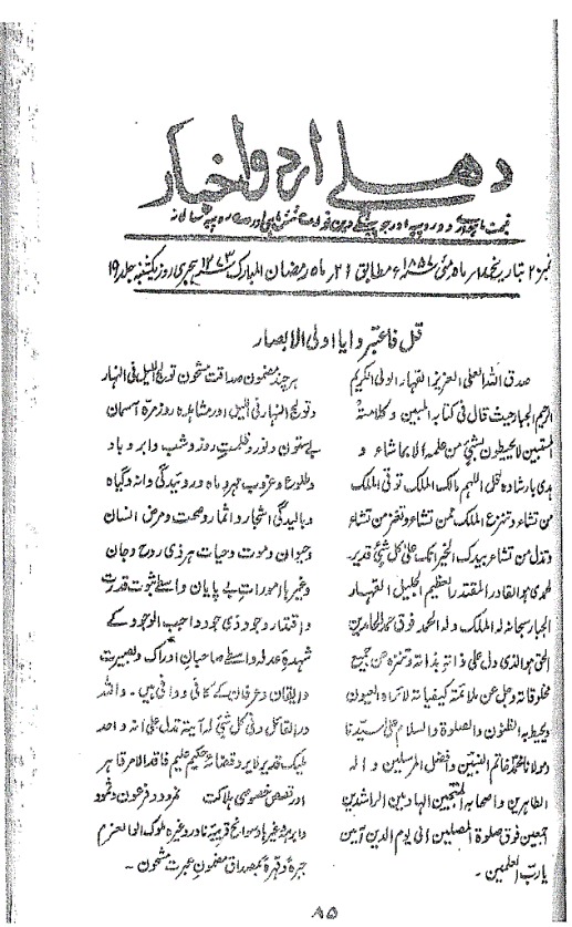 Delhi Urdu Akhbar